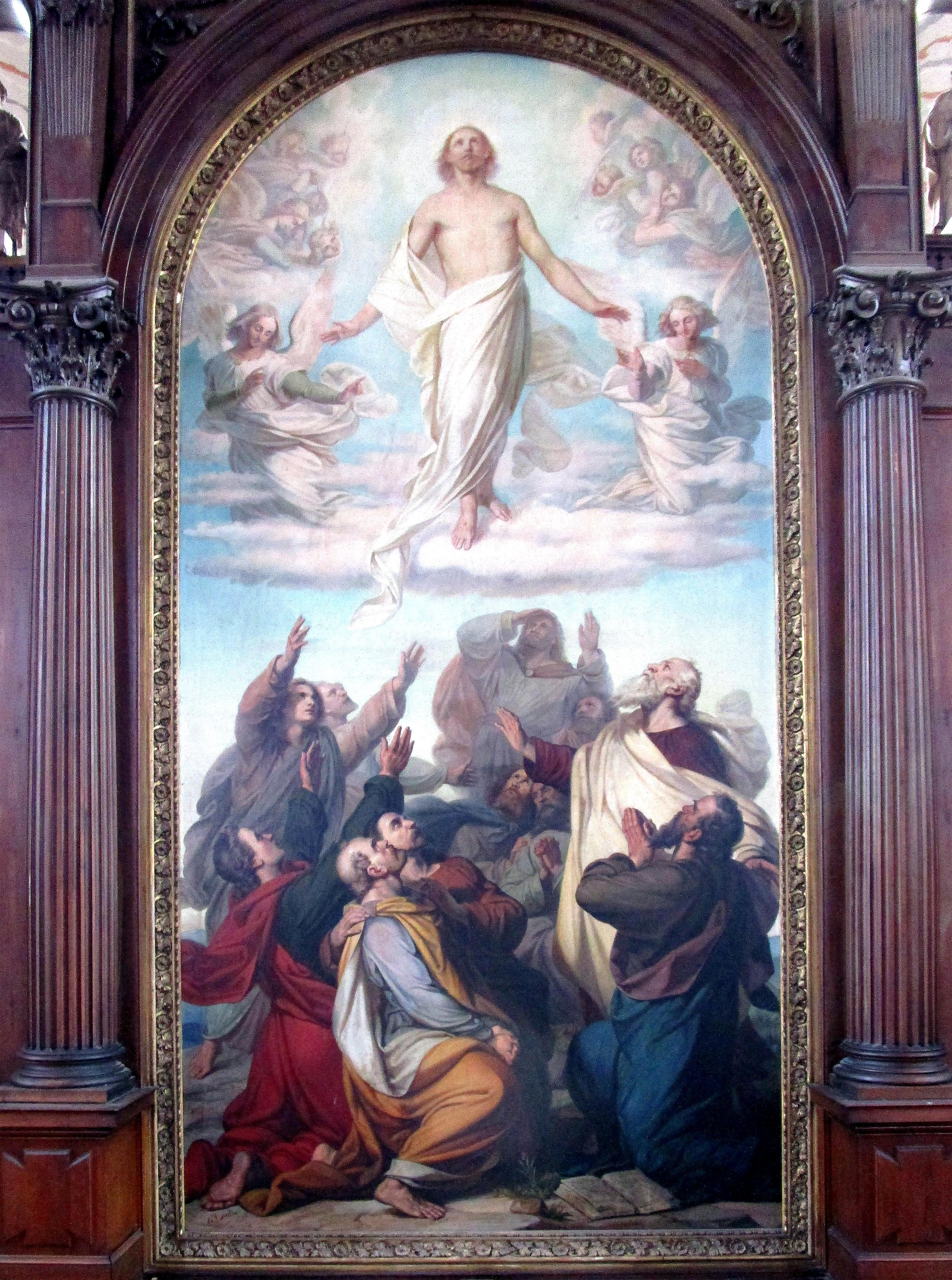 Altargemälde des Gaston Lenthe (aus dem Jahre 1858) in der Kirche St. Nikolai (Schelfkirche) Schwerin. Es stellt die Himmelfahrt Christi dar und ist eine Kopie des sich in der Hofkirche zu Dresden befindlichen Originals von Anton Raphael Mengs.